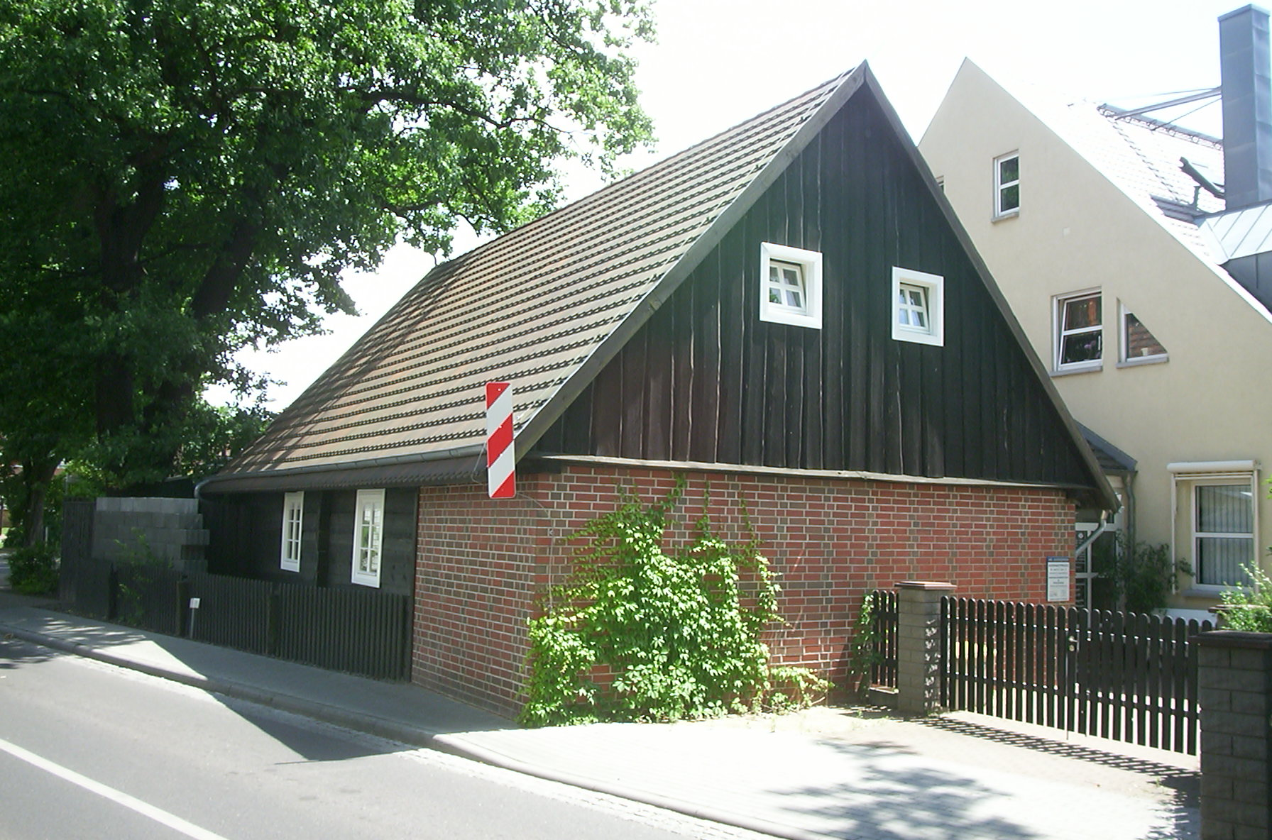 Denkmalgeschütztes Haus Tiergartenstraße 1 im „Alten Dorf“ Weißwassers an der Tiergartenstraße Ecke Berliner Straße.